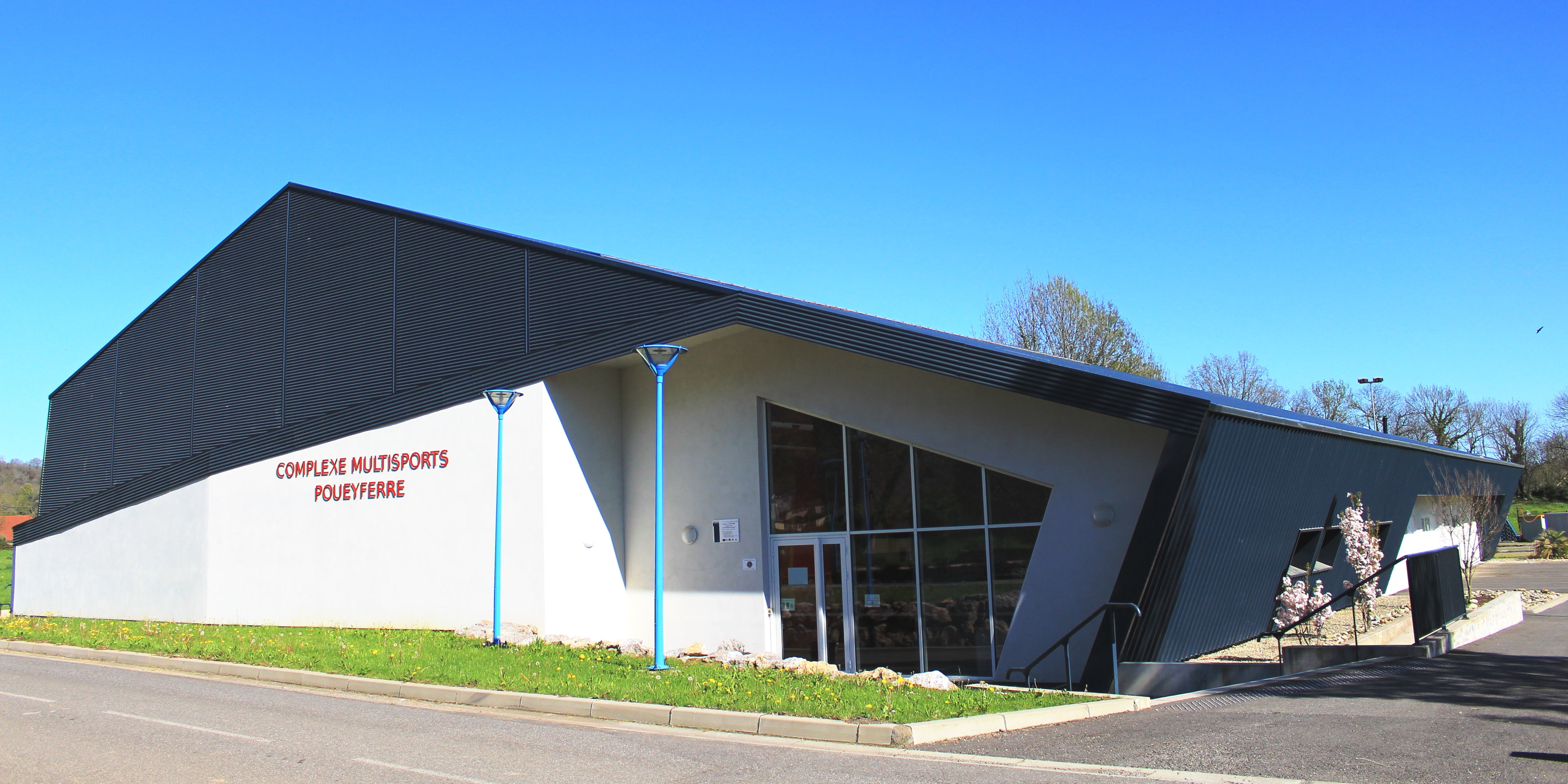 Gymnase de Poueyferré (Hautes-Pyrénées)